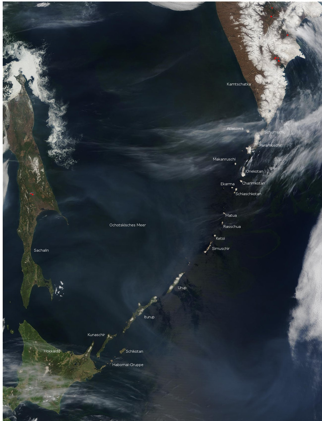 Satellitenfoto der Kurilen Erstellt aus Quelle: Namen der Inseln selbst ergänzt